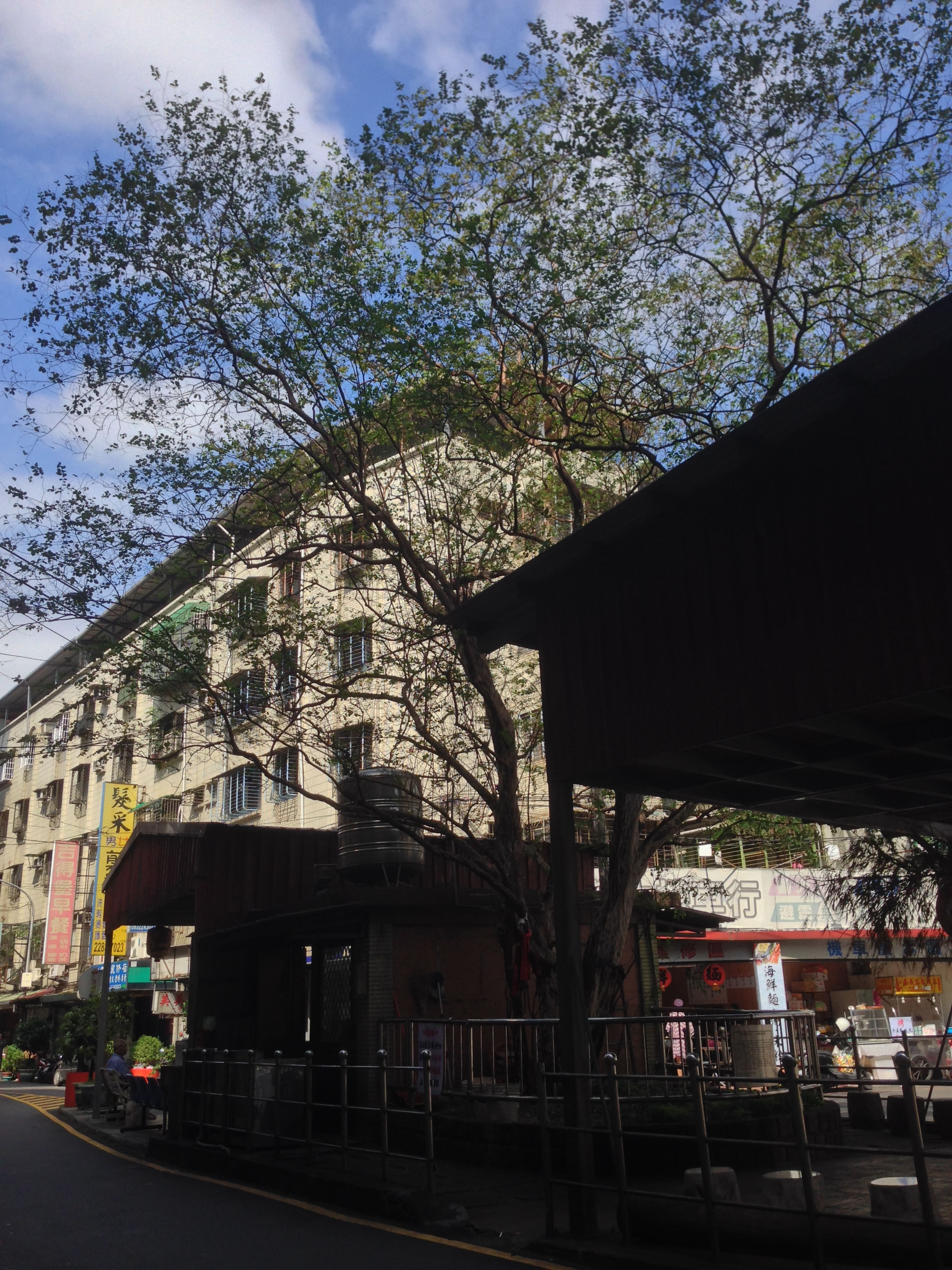 九芎公廟第四代九芎公樹